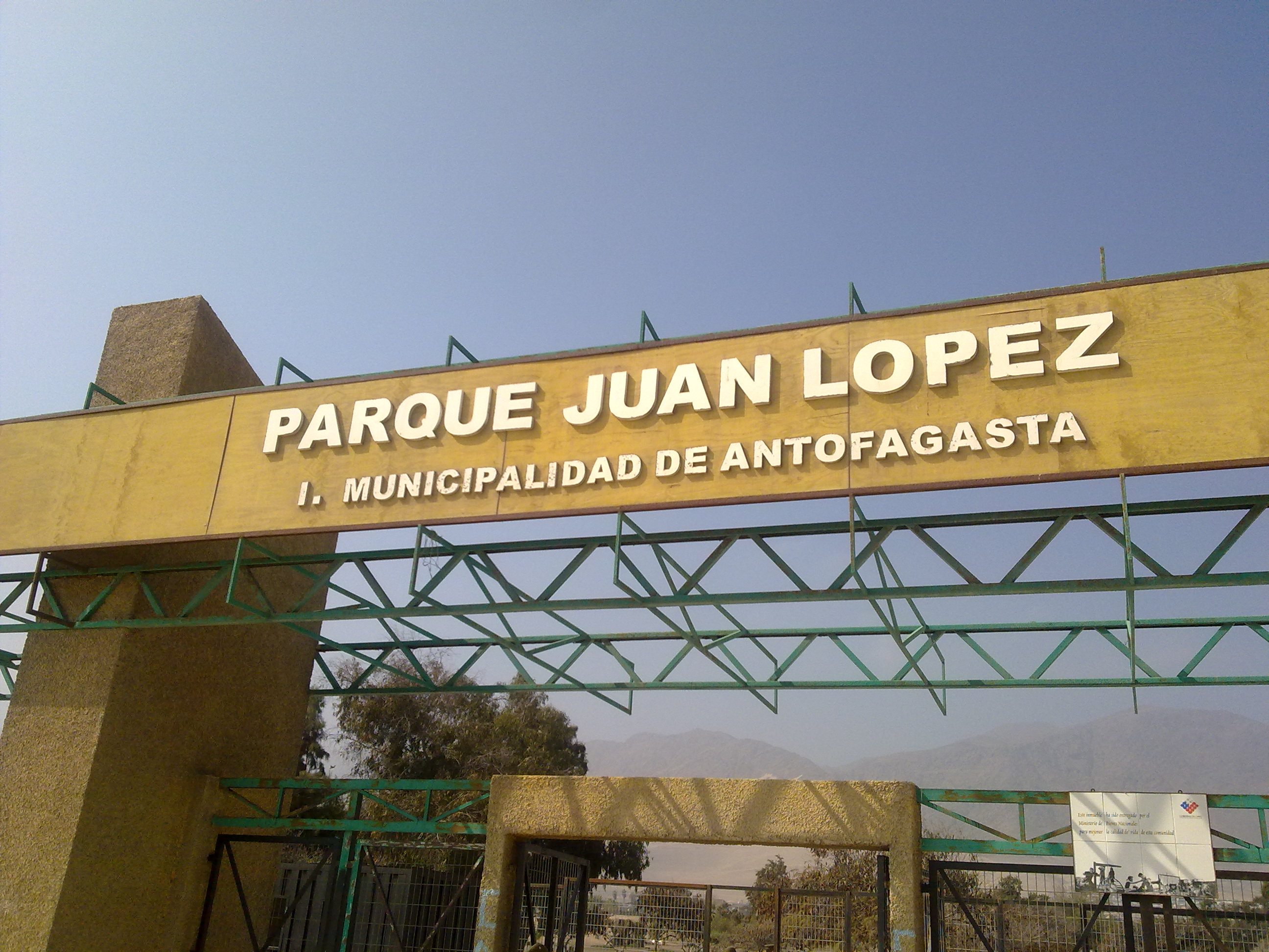 Ingreso al Parque Juan López